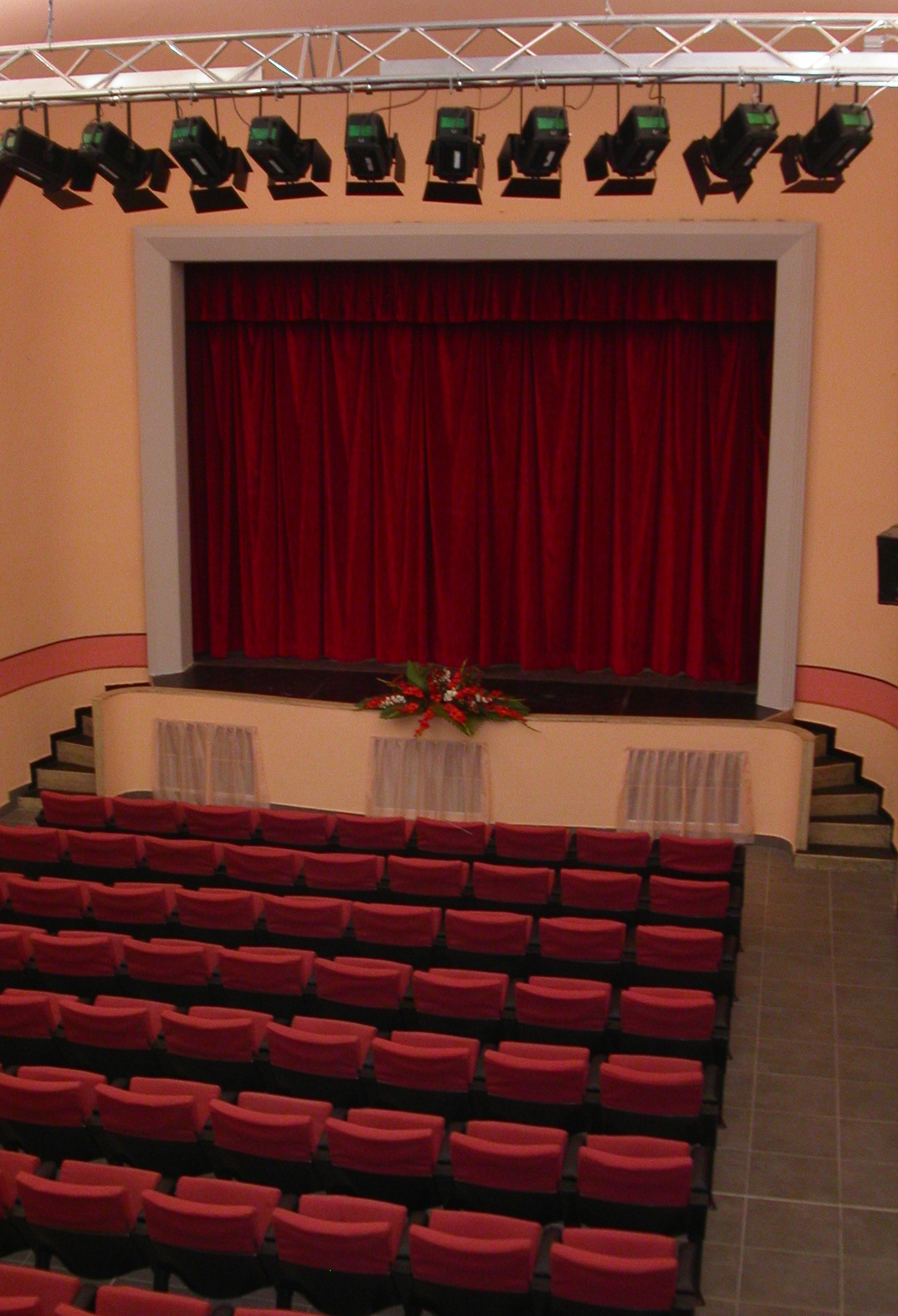 Il teatro ai giorni nostri come rinnovato nel 2004